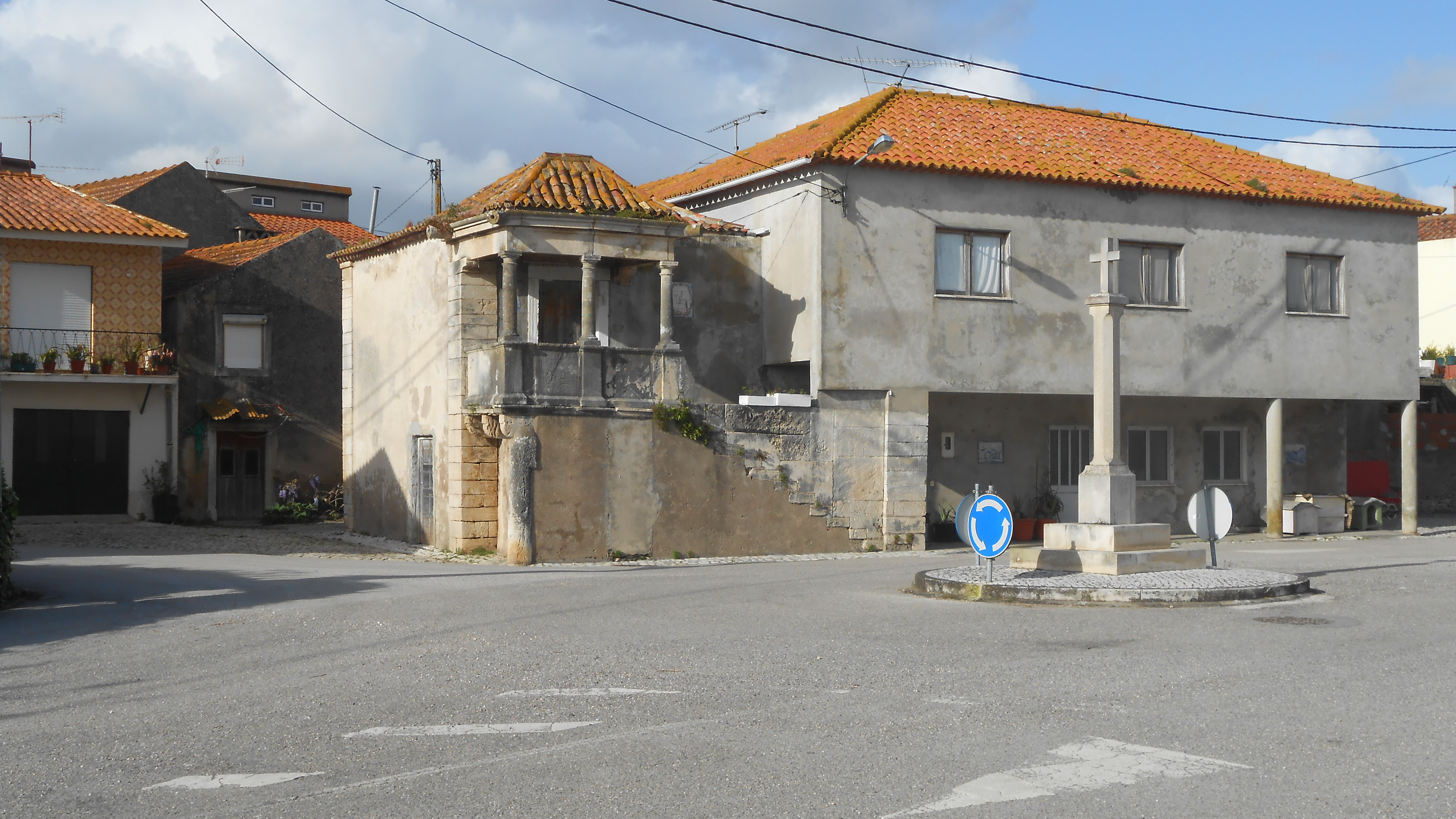 Das denkmalgeschützte Wohnhaus Casa do Torreão aus dem 16. Jahrhundert